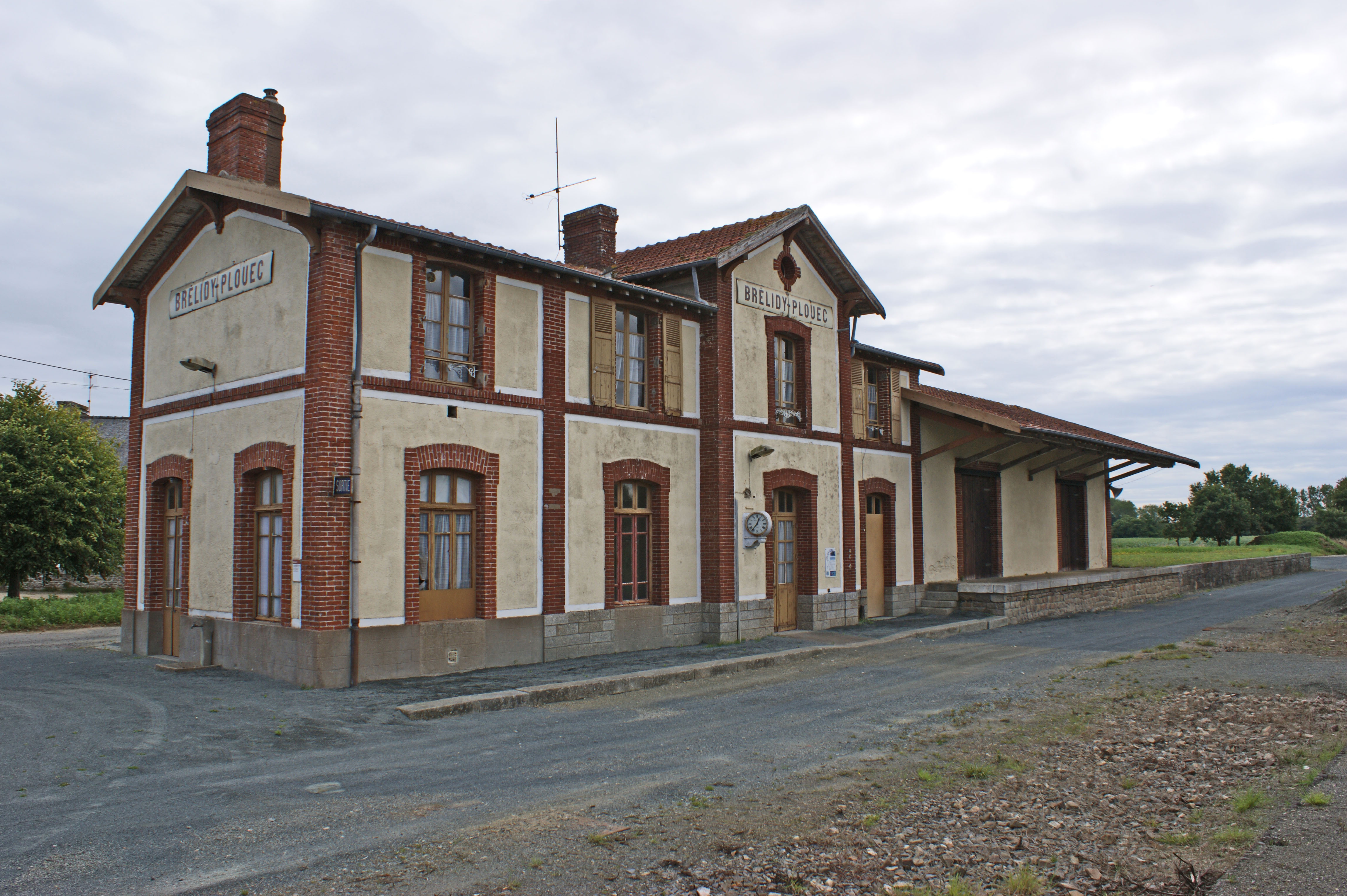 L'ancien bâtiment du réseau breton agrandit pour la ligne des chemins de fer des Côtes du Nord de Plouëc à Tréguier. Propriété de la commune et restauré en 2005.